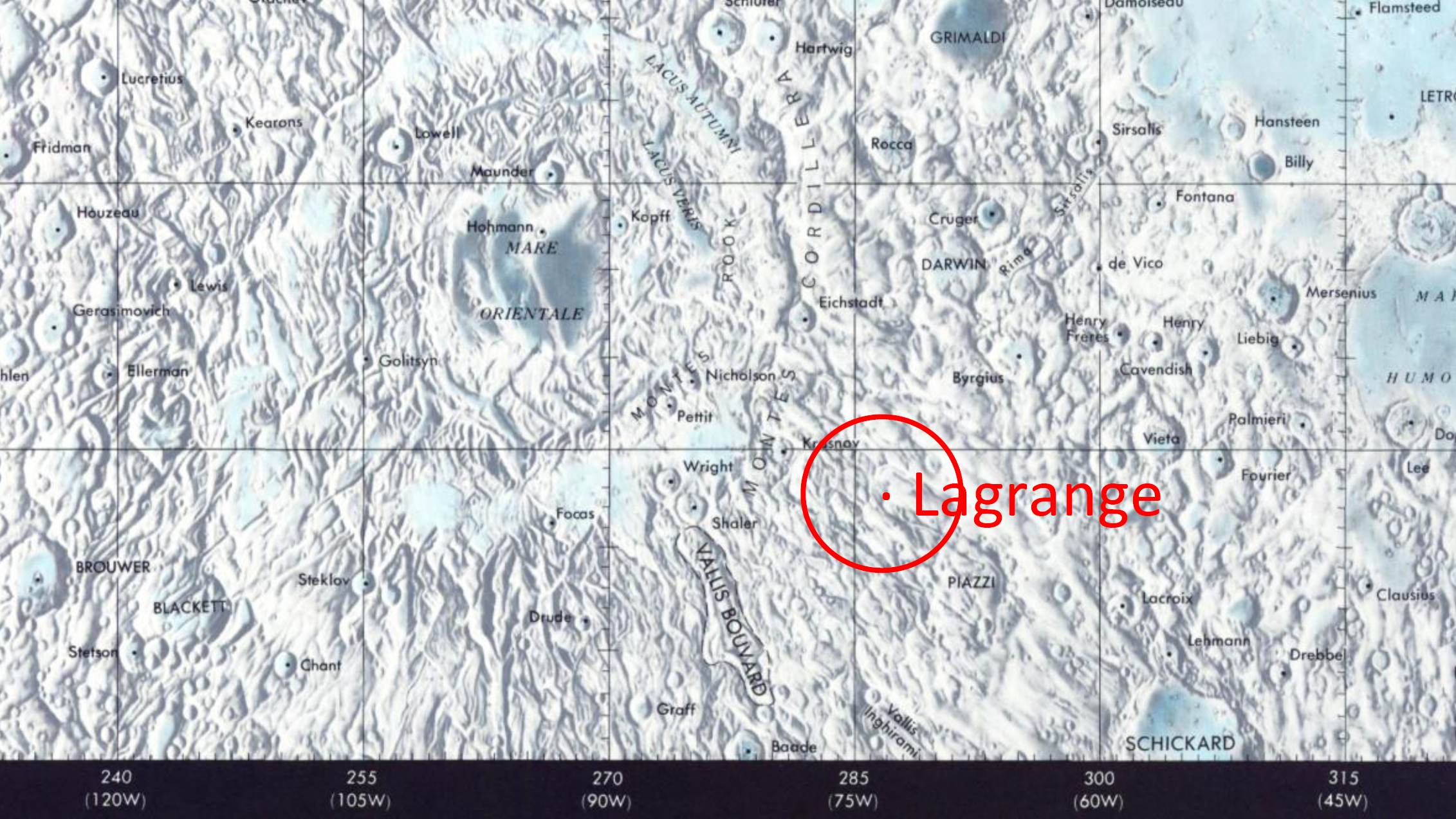 Detalle de la imagen Moonmap from Moon Map - Equatorial region 45S to 45N - LPC1 - NASA del cráter Lagrange